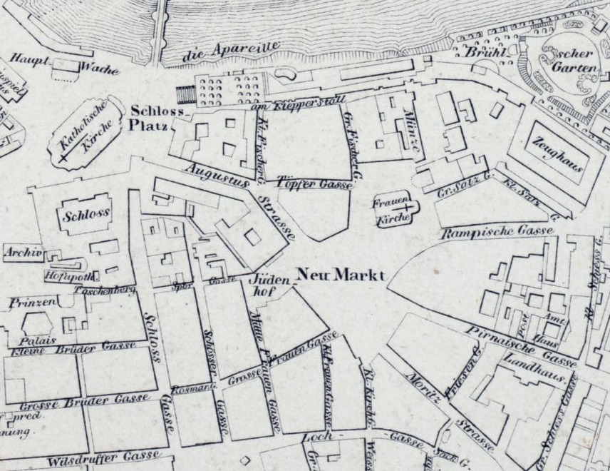 Ausschnitt Jüdenhof aus: Lesch, Heinrich Grundriss von Dresden nach der neuesten Aufnahme, 1:9 000, Lithographie, 1828